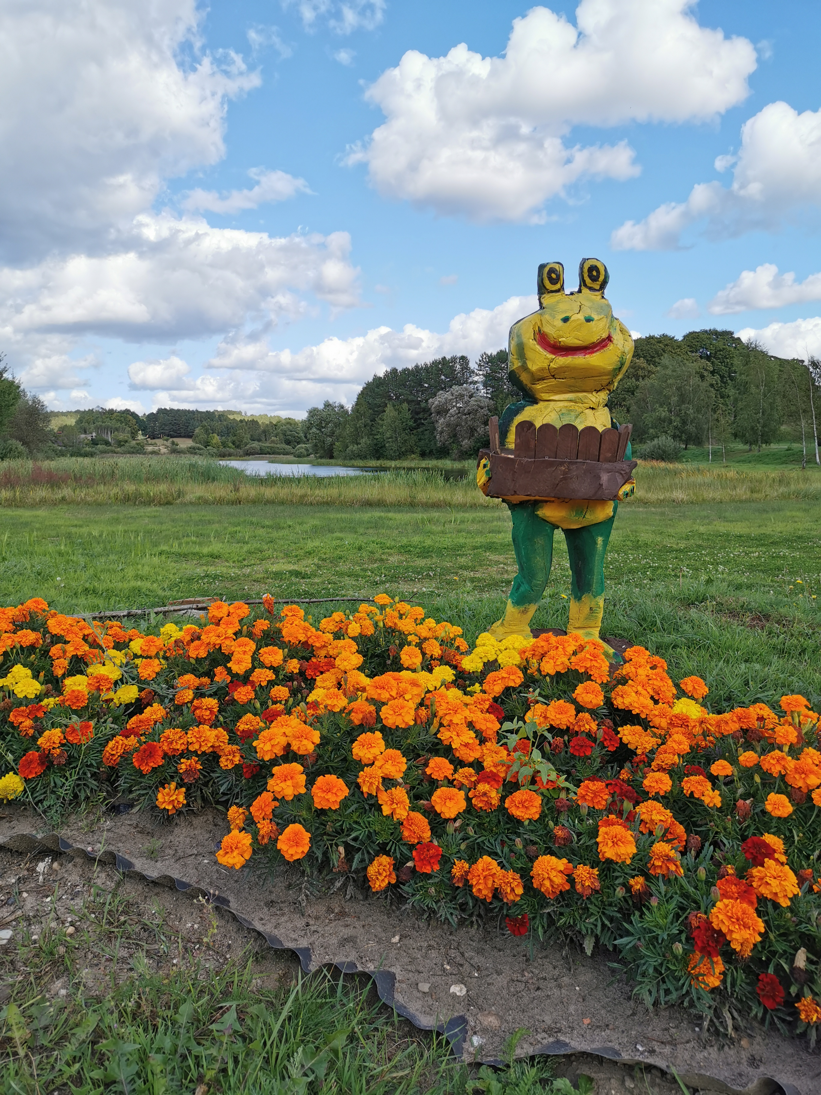 Skalniki w Żabnie